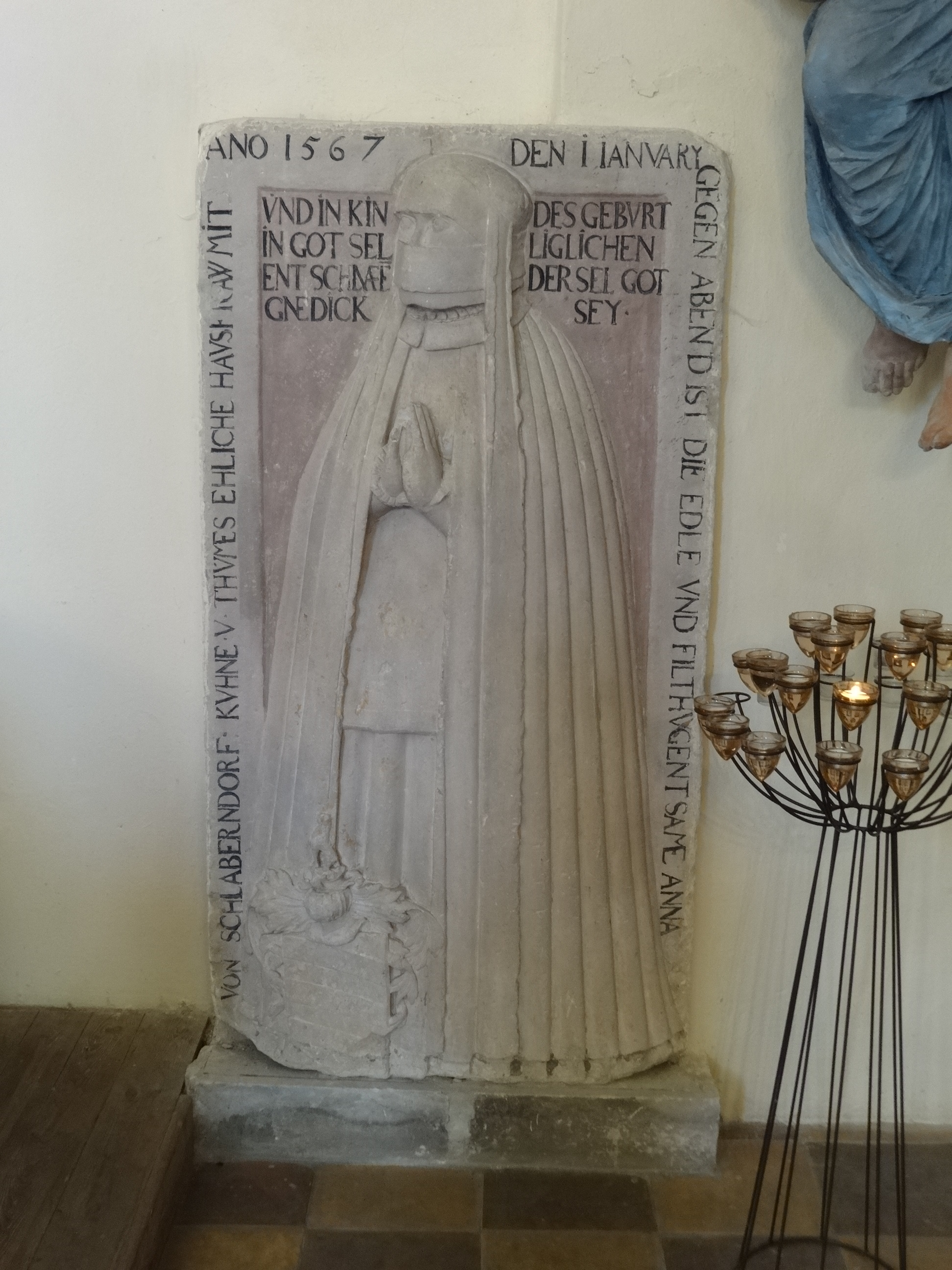 Reichhaltige Ausstattung der Dorfkirche Blankensee, Trebbin, Brandenburg